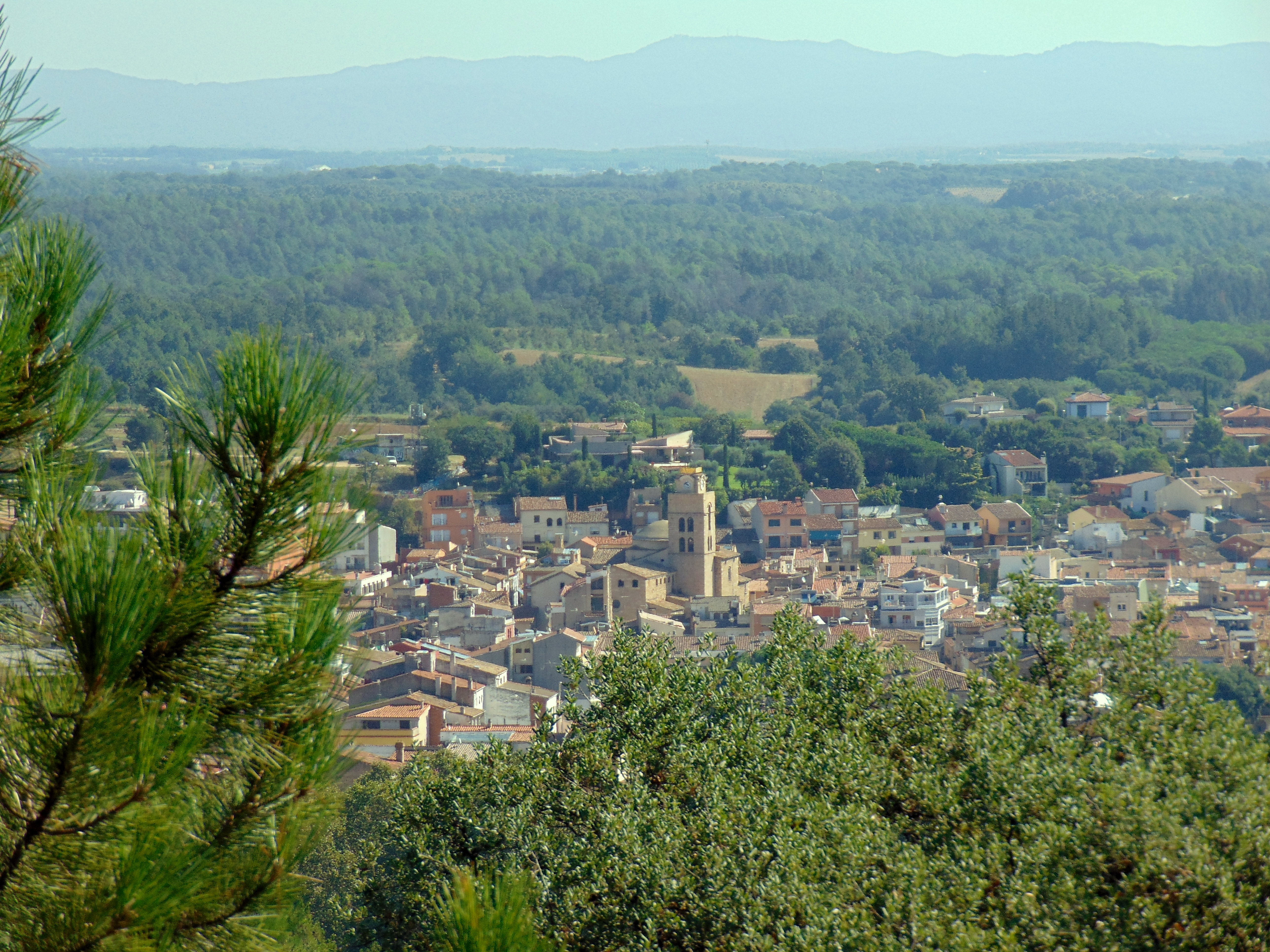 Vista de Santa Coloma de Farners pujant al castell de Farners